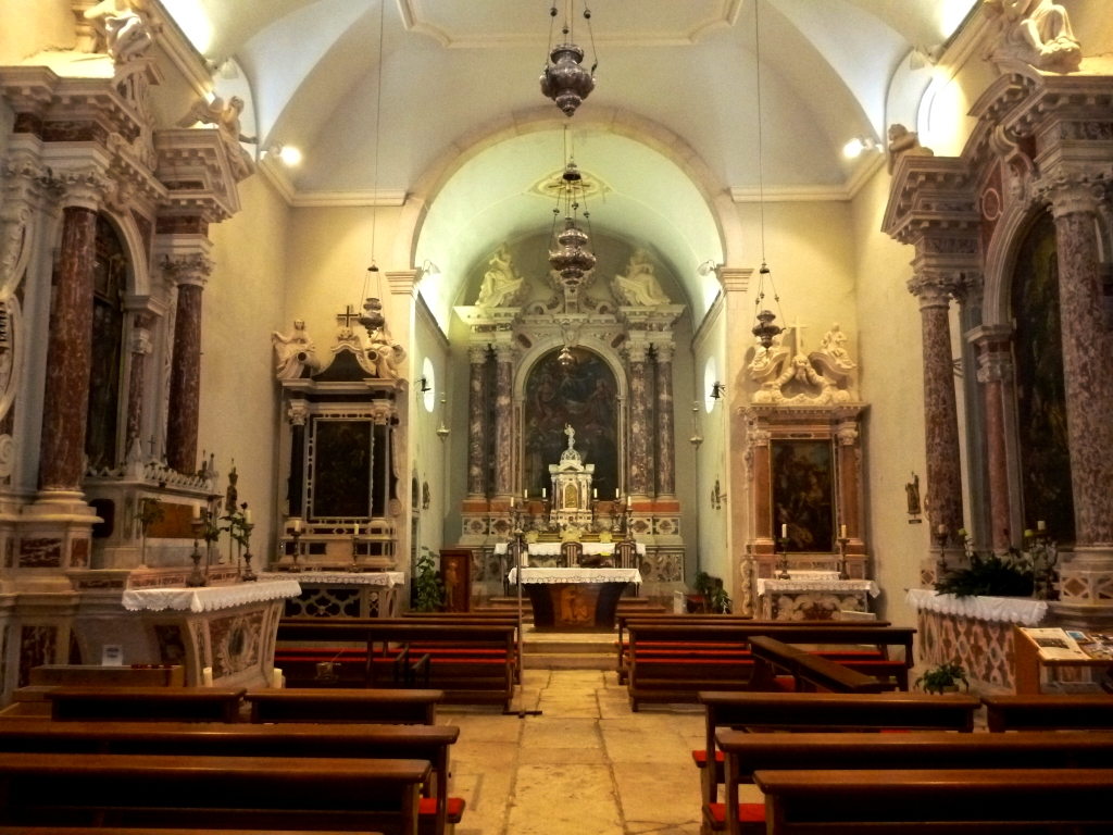 Crkva sv. Ivana Krstitelja u Kaštel Starom: interijer